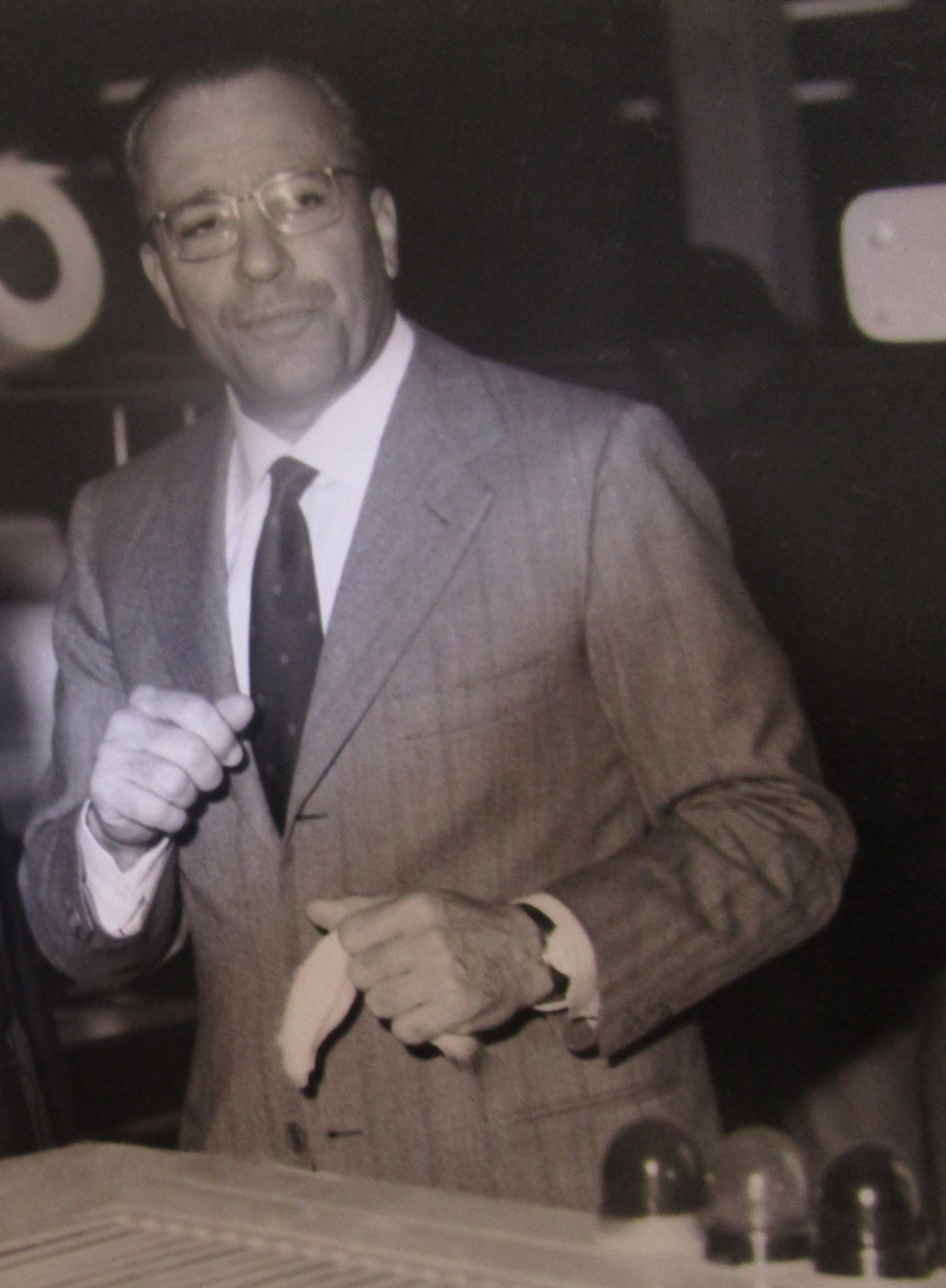 Industriale tessile lombardo (1923-2005)